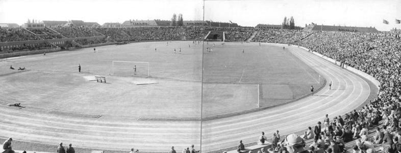 Rostock, Ostsee-Stadion, Fußballspiel Zentralbild Löwe 13.6.1957 Entwicklung des Ostseebezirks - Neue Sportanlagen in Rostock Unter der Arbeiter- und Bauernmacht hat die Demokratische Sportbewegung im Ostseebezirk eine imposante Aufwärtsentwicklung genommen. 868 Sportanlagen stehen jetzt den Aktiven zur Verfügung. Daruter sind allein im Bezirk mehr öffentliche Anlagen als zur Zeit der Weimarer Republik in ganz Mecklenburg. In den letzten drei Jahren hat die Regierung der DDR unter anderem 26 Millionen DM für den Aufbau sportlicher Einrichtungen für rund 40.000 Sportler aufgewendet. Unter Mithilfe Tausender Sportler im Nationalen Aufbauwerk entstanden u.a. das modernste Hallenschwimmbad sowie das Ostseestadion in Rostock. UBz: Das Ostseestadion mit seinen 25.000 Plätzen während des DDR-Ligaspieles Empor Rostock gegen Motor Dessau.